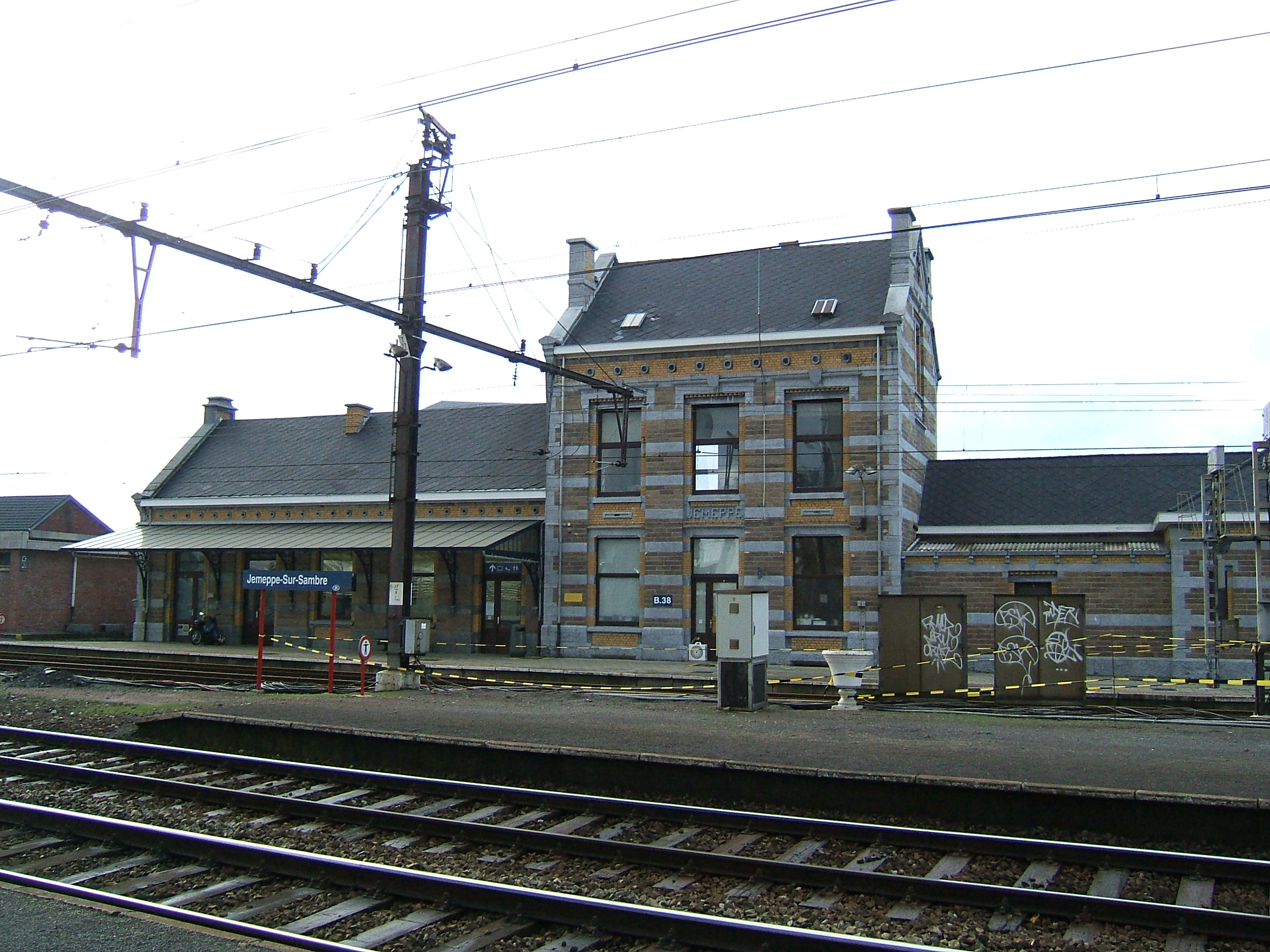 Jemeppe-sur-Sambre, Belgium, railway station